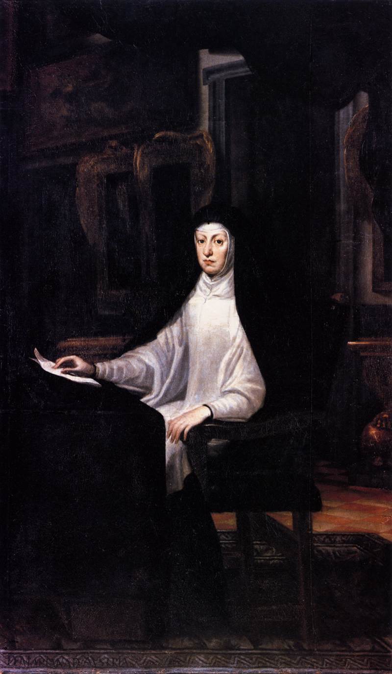 Retrato de la reina Mariana de Austria (1634-1696), que fue la segunda esposa del rey Felipe IV de España y la madre de Carlos II, durante cuya minoría de edad actuó como regente del reino.